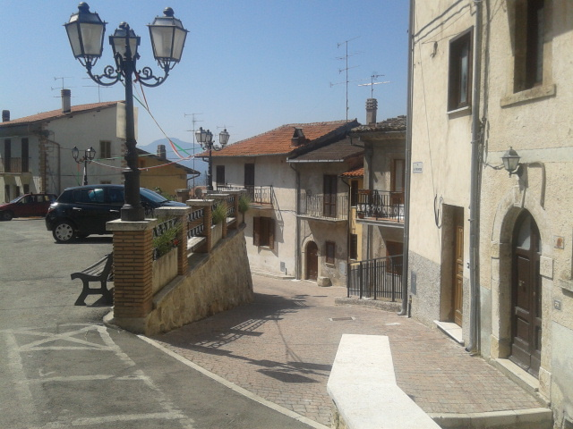 Scorcio fotografico di Santo Stefano dei Marsi